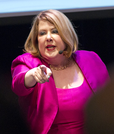 Me Anne-France Goldwater